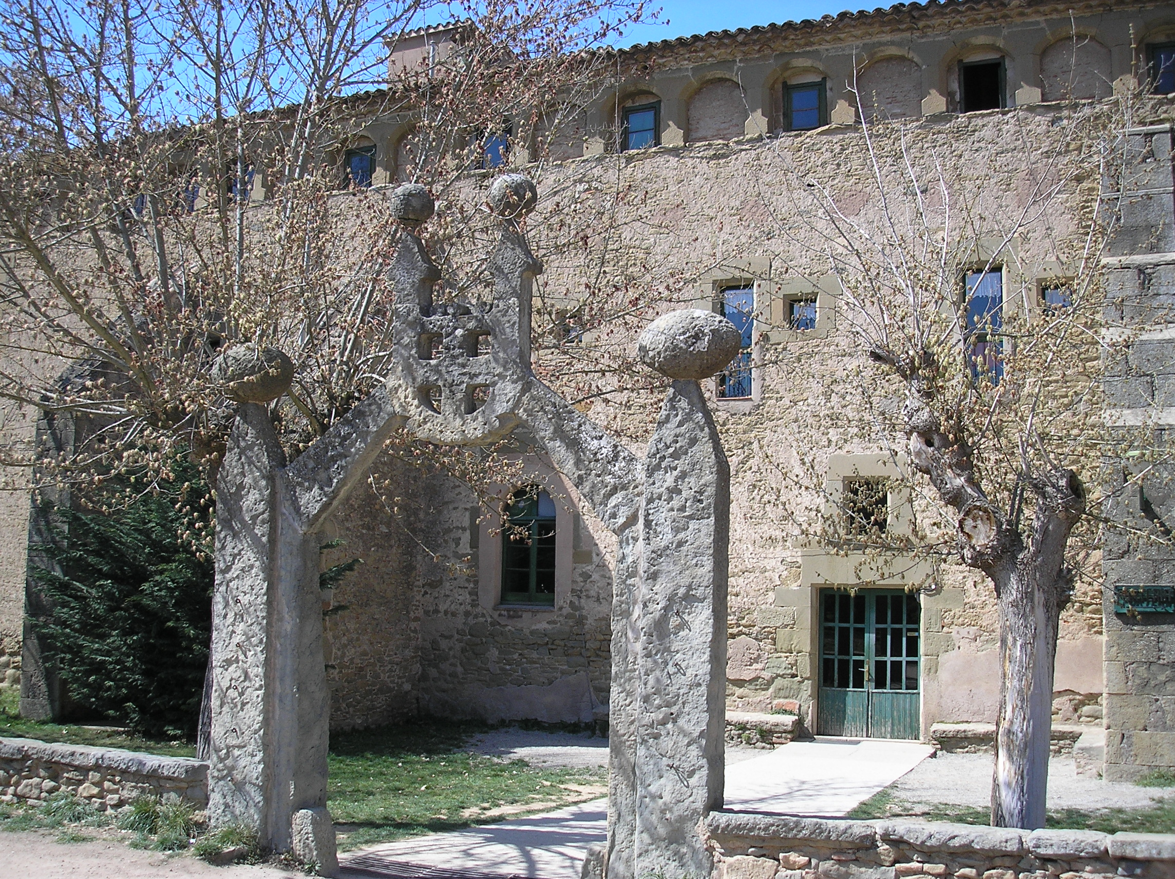 Sant Tomàs de Riudeperes. Antic monestir canonical, fundat amb els esforços de la família dels Riudeperes a finals del segle XI, el 1560 es va convertir en convent franciscà. Entre 1901 i 1970 va ser noviciat i residència dels pares camils. Actualment acull una escola per a disminuïts psíquics. Almenys des del 1045 hi ha documentada una església dedicada a sant Tomàs, situada en un lloc no molt llunyà d'on es va alçar el nou edifici. Des del 1086 els seus clergues vivien en canonicat. El 1095 es va consagrar la nova església. El 1560 el bisbe Jaume Caçador, amb el seu nebot Guillem, van transformar l'antiga canònica en un convent de franciscans observants. En aquella època Sant Tomàs només tenia un atri en el qual hi havia alguns sepulcres antics dels Riudeperes i dels Alta-riba, una casa petita, i un claustre i un hort sense tancar. Les obres van iniciar-se el 1561, fetes en la seva major part pel mestre de cases Guillem Vaxeres.